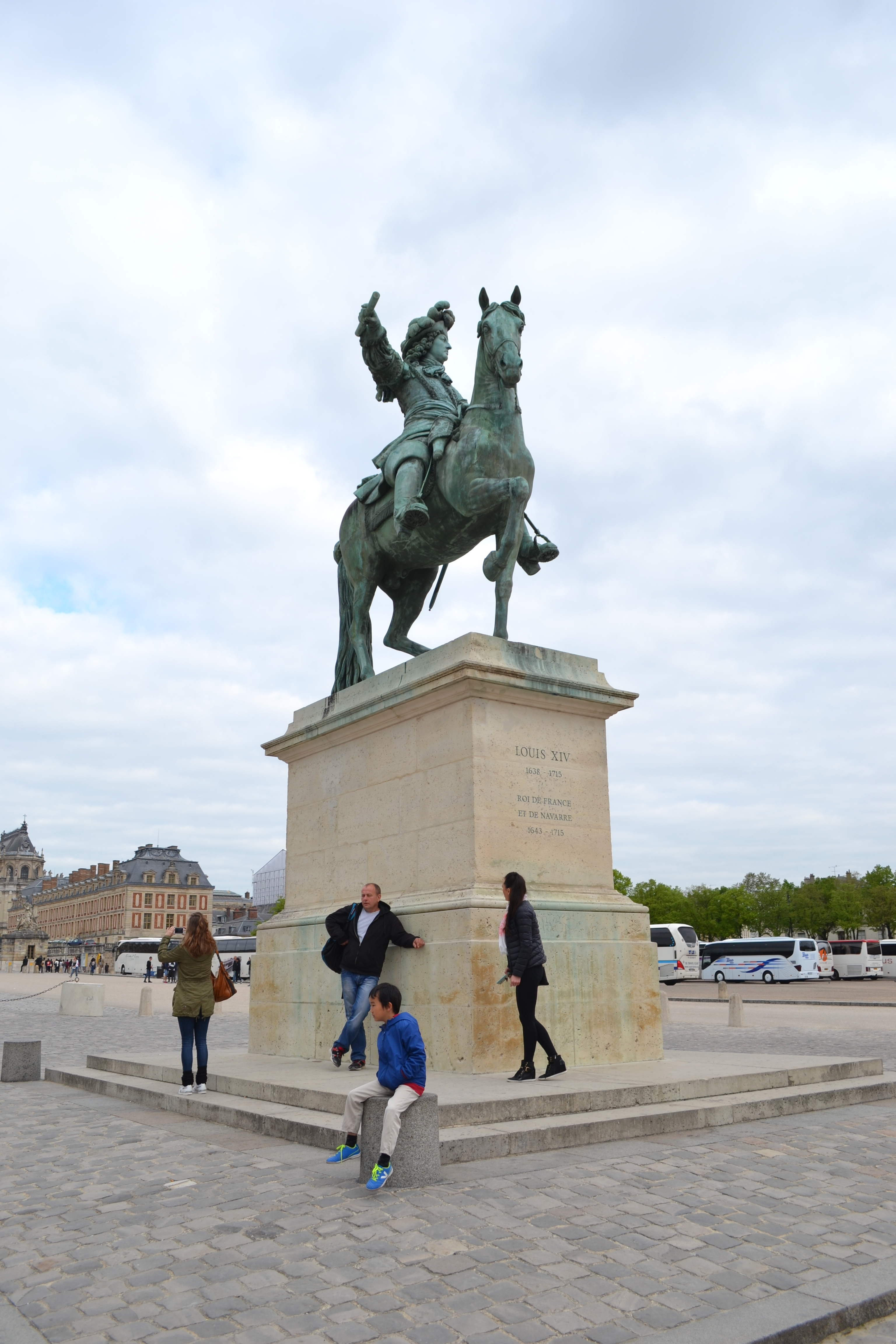 Versailles, place d'armes, statue équestre de Louis XIV.